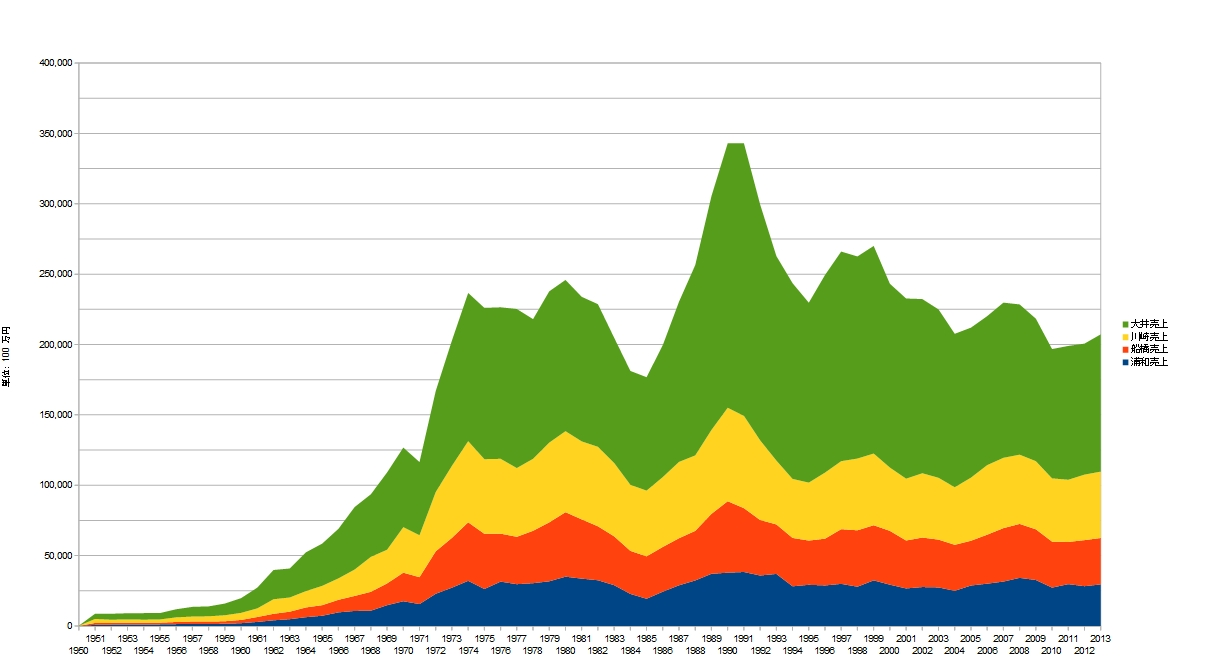 南関東公営競馬の売上(1950-2013)地方競馬全国協会『地方競馬史』より作成。